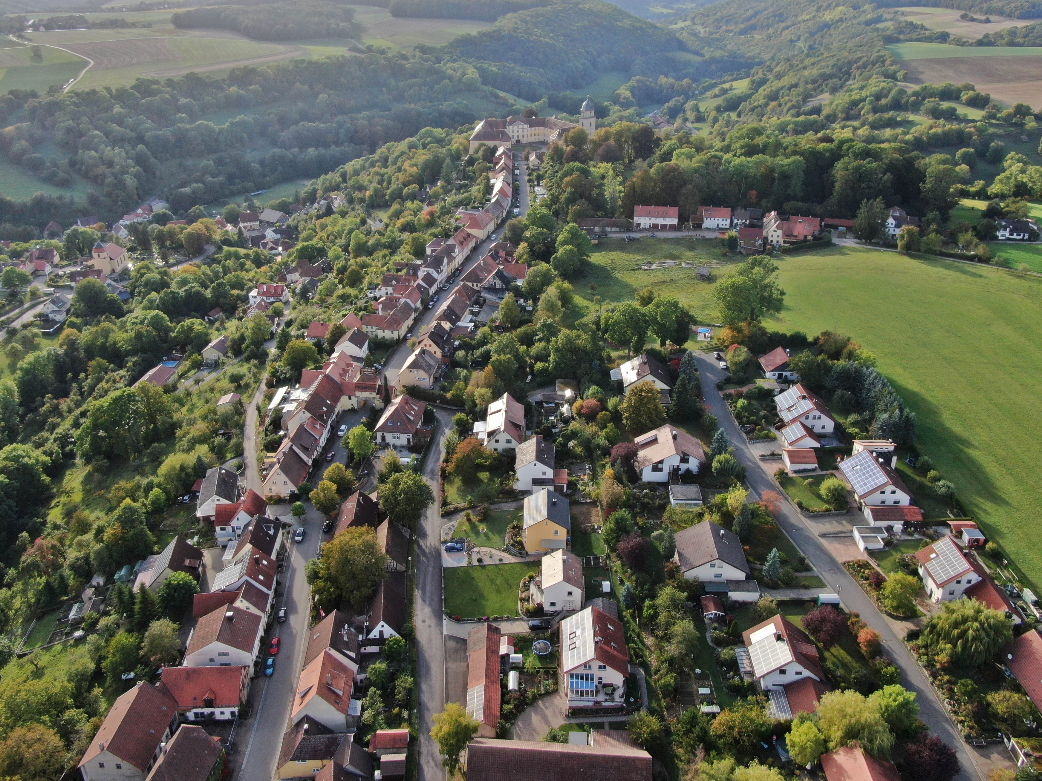 Luftaufnahme der Residenzstadt Bartenstein in Hohenlohe mit Schloss, Torbogen und Hofgarten. Ansicht von Osten im Herbst 2019